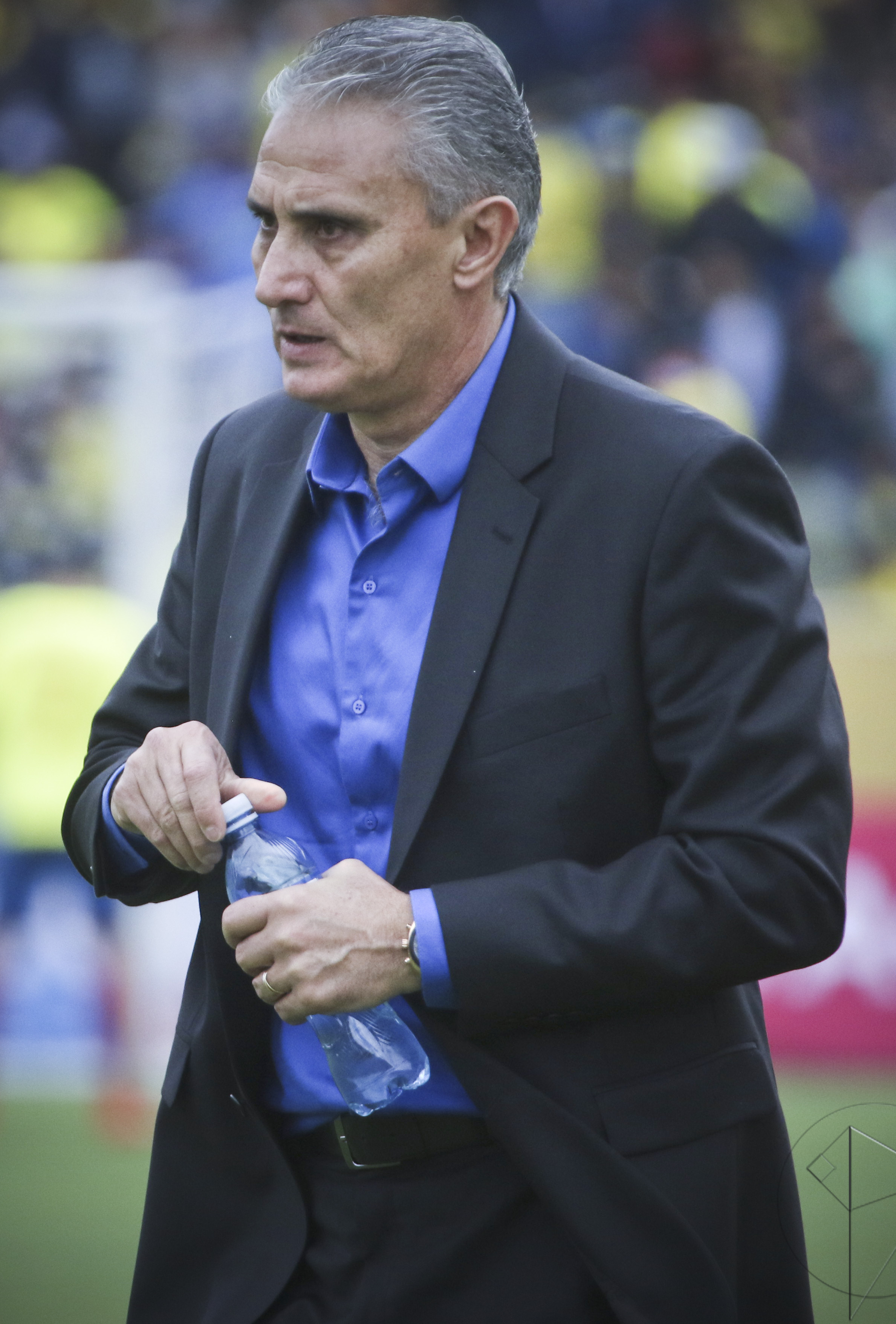 selccion 3 mav